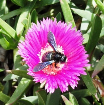 Mesembryanthemum o Lampranthus (Aizoacee)